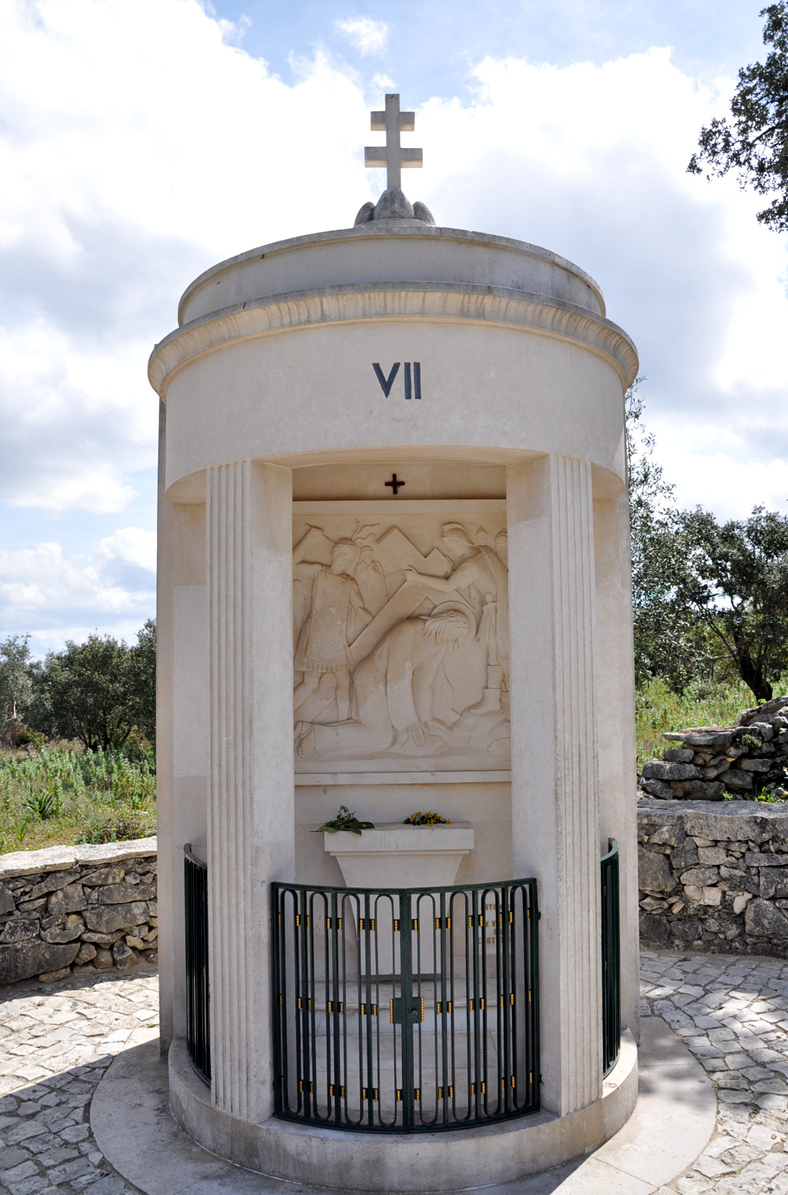 Calvário Húngaro, Fátima